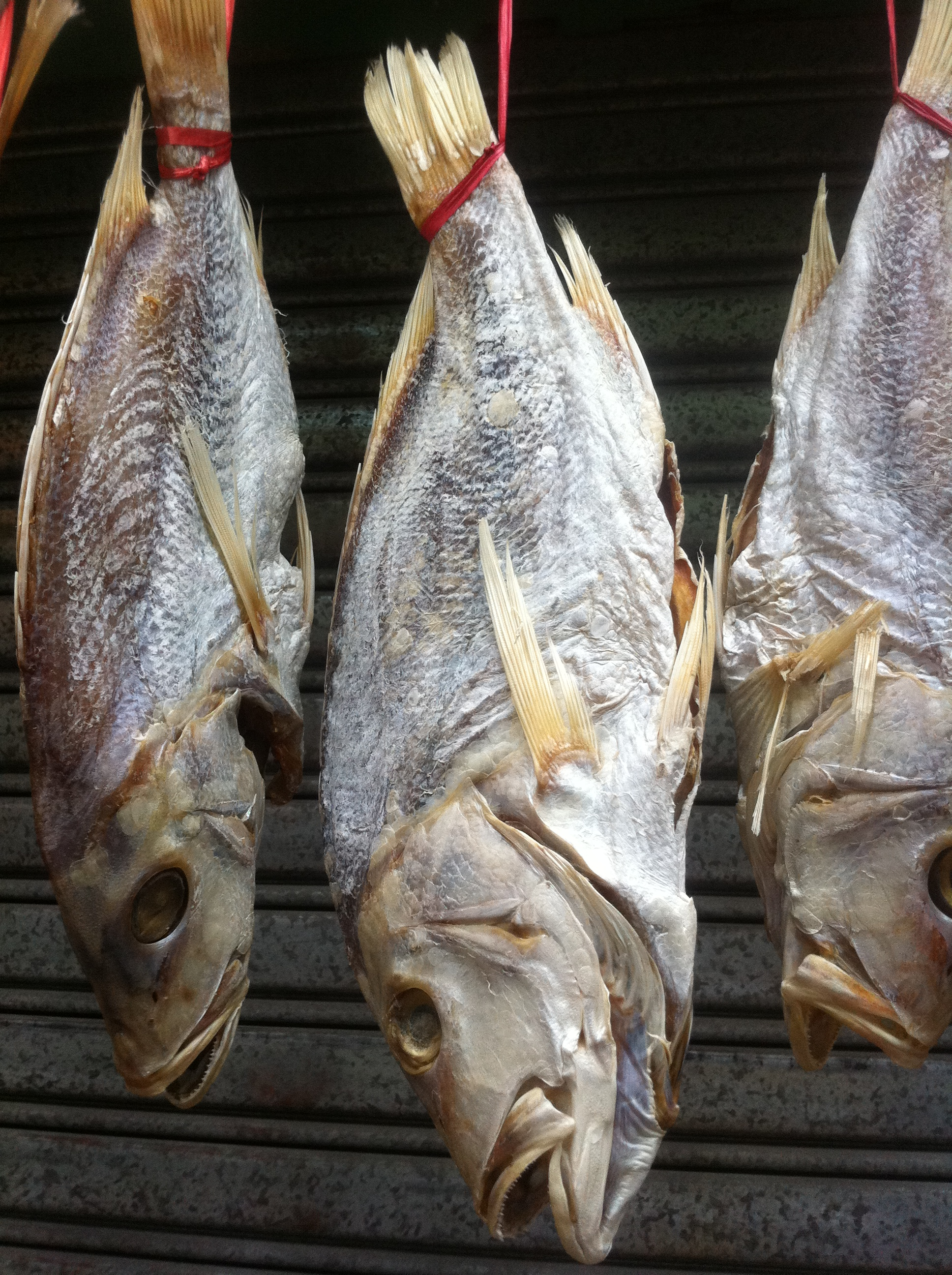 中文（香港）: 上環李陞街